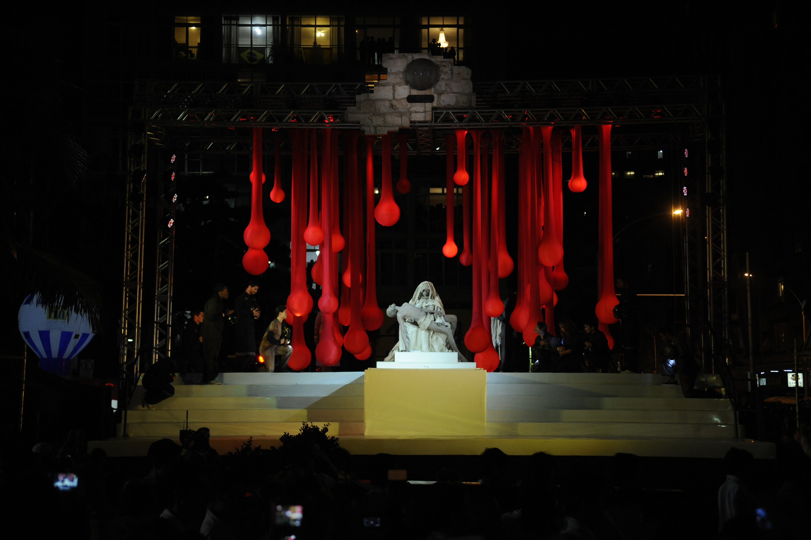 Rio de Janeiro - Encenação da Via Sacra, na Praia de Copacabana